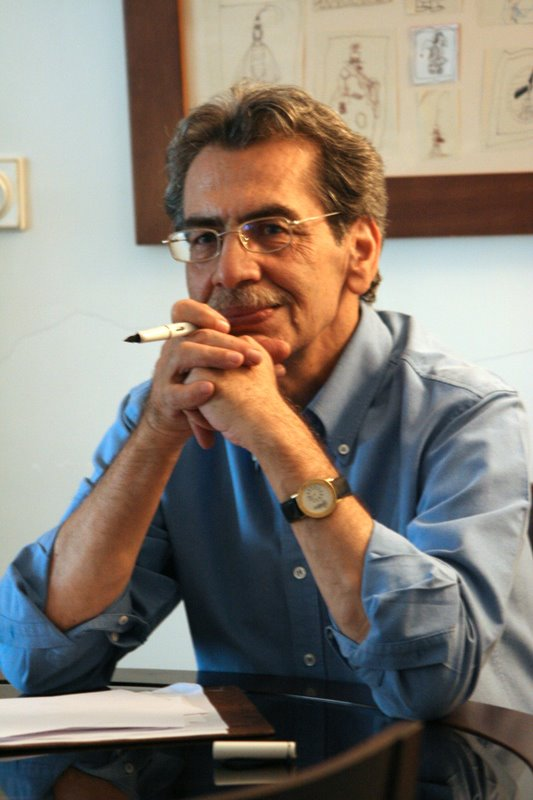 کامبیز درمبخش، ماریماتوریست و گرافیست ایرانی.